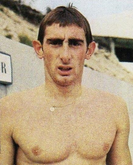 SPORT VEDETTES-PANINI 1974-Figurina n.185- ROUSSEAU - FRANCIA -NUOTO-Rec